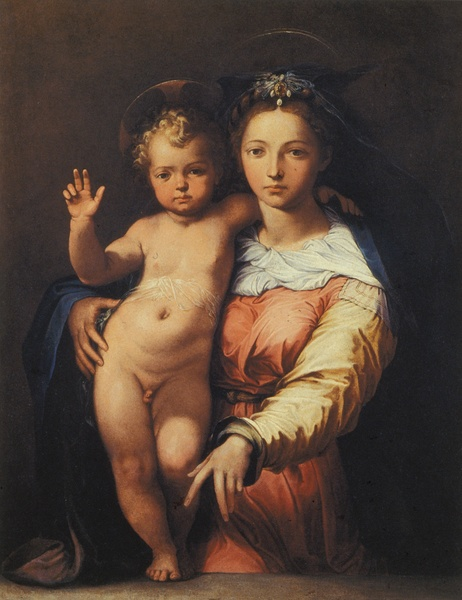 Madonna col Bambino, olio su tela, Roma, Palazzo Montecitorio